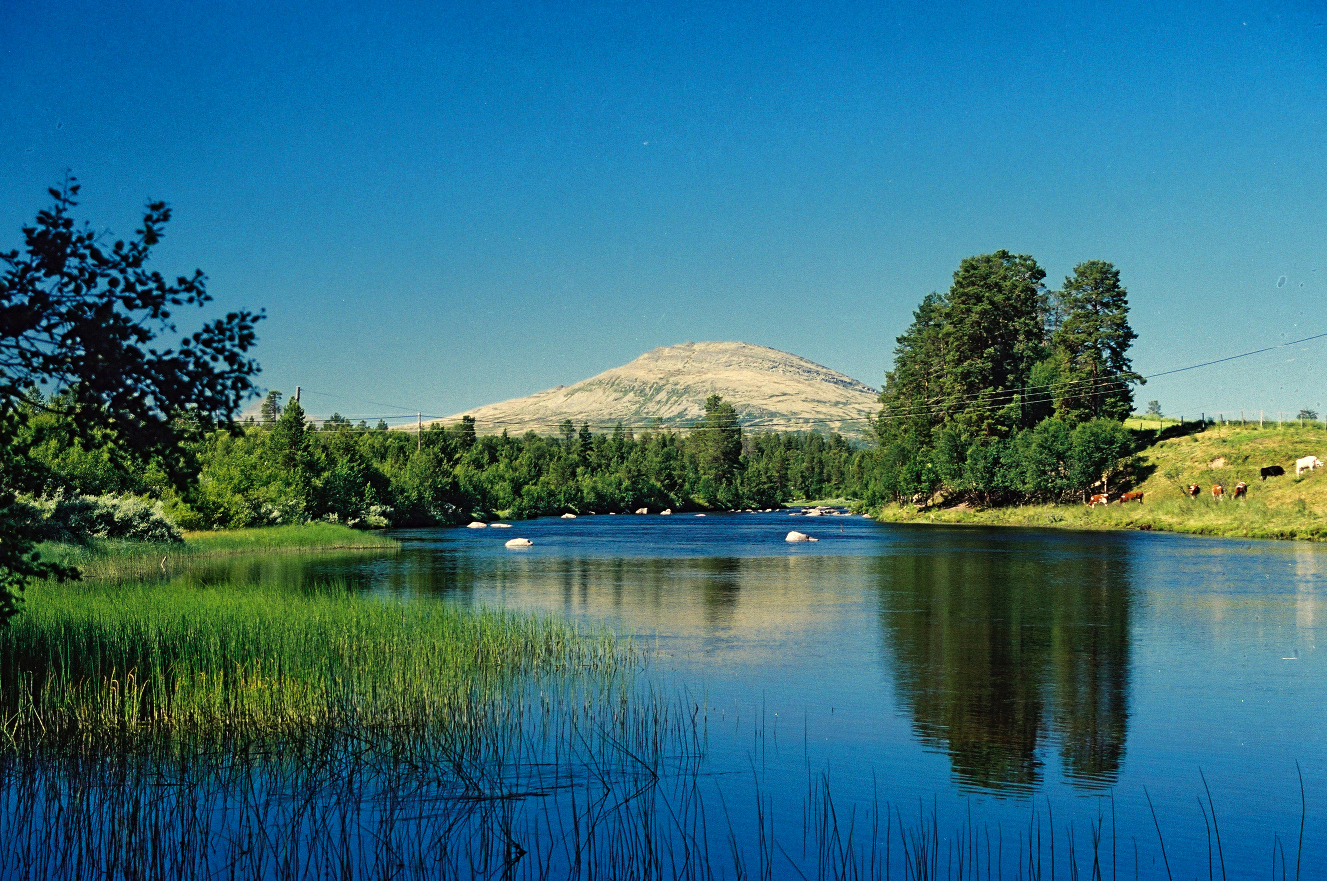 Bilde av Sømåelva, fra den sørligste delen av den.